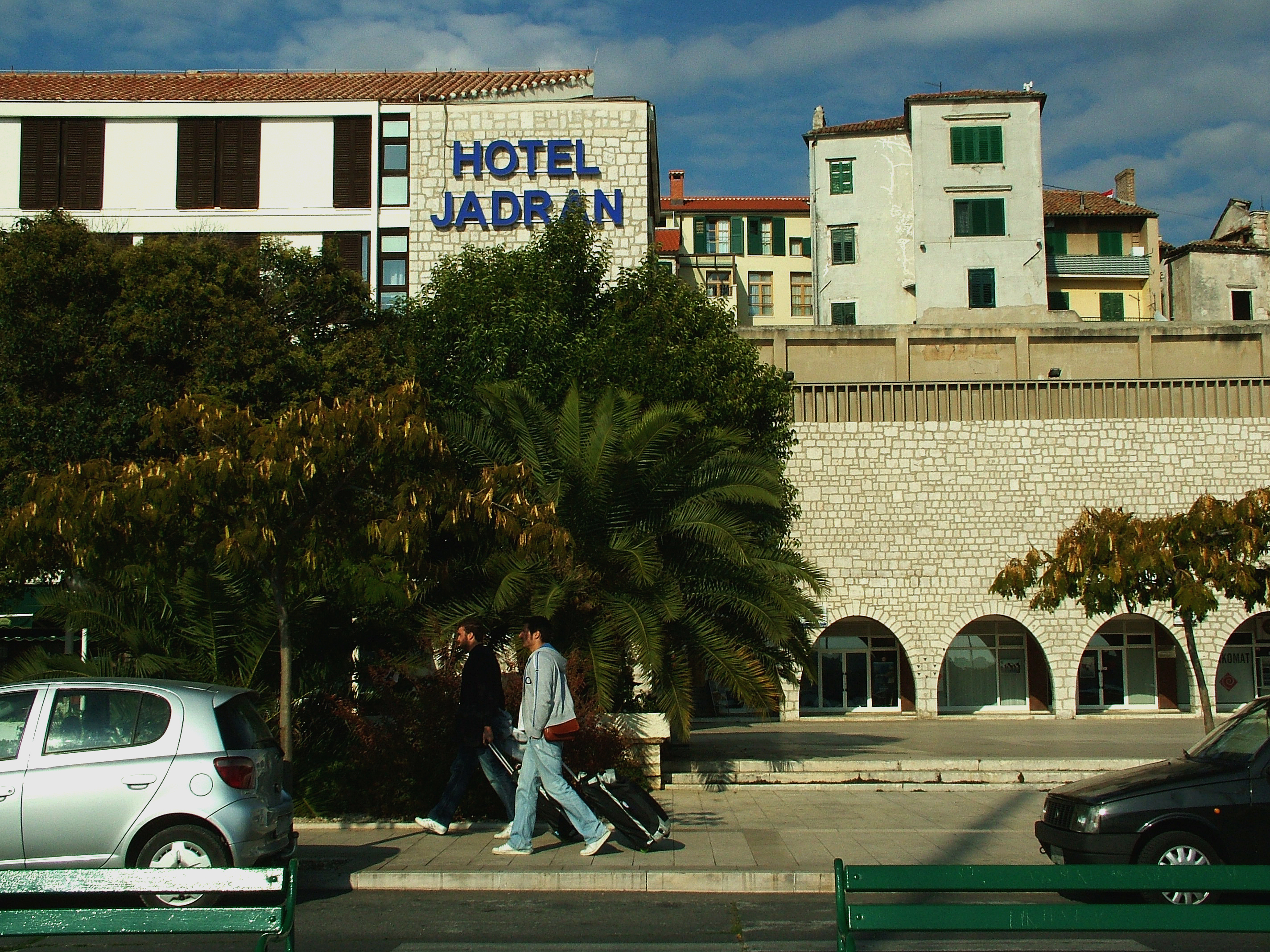 Sibenik: Tengerparti sétány (Horvátország)